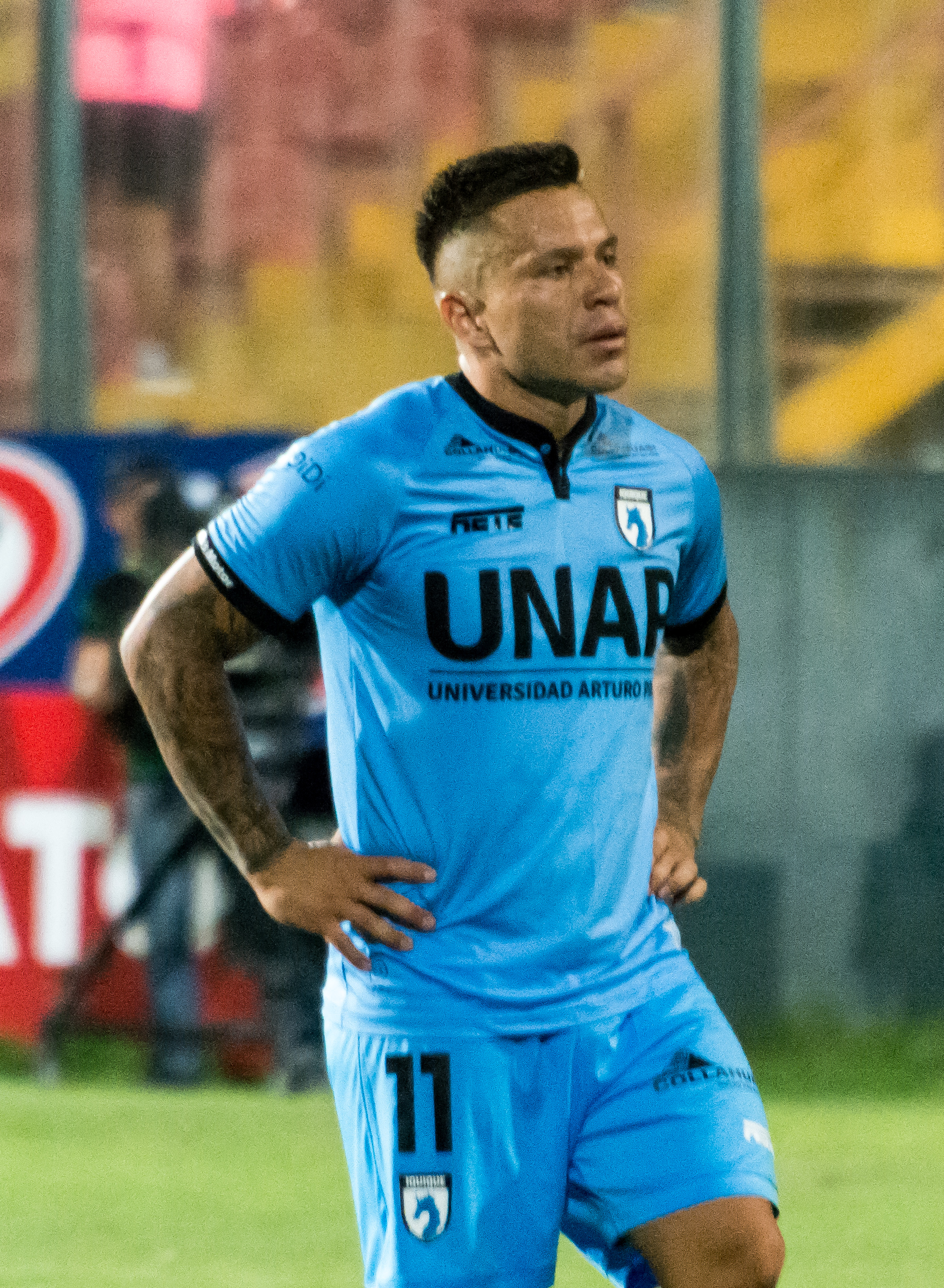 Unión Española v Deportes Iquique, Estadio Santa Laura, Independencia, Santiago, Región Metropolitana, Chile